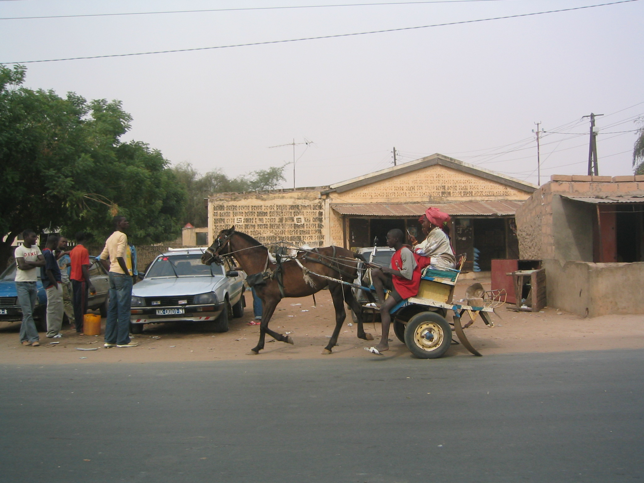 A Meckhe (Sénégal), sur la route allant de Thiès à Saint-Louis-du-Sénégal